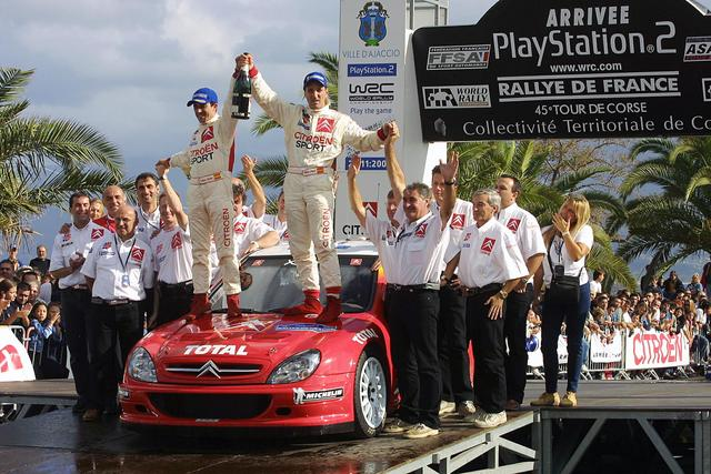 Podium del Rally de Córcega en 2001